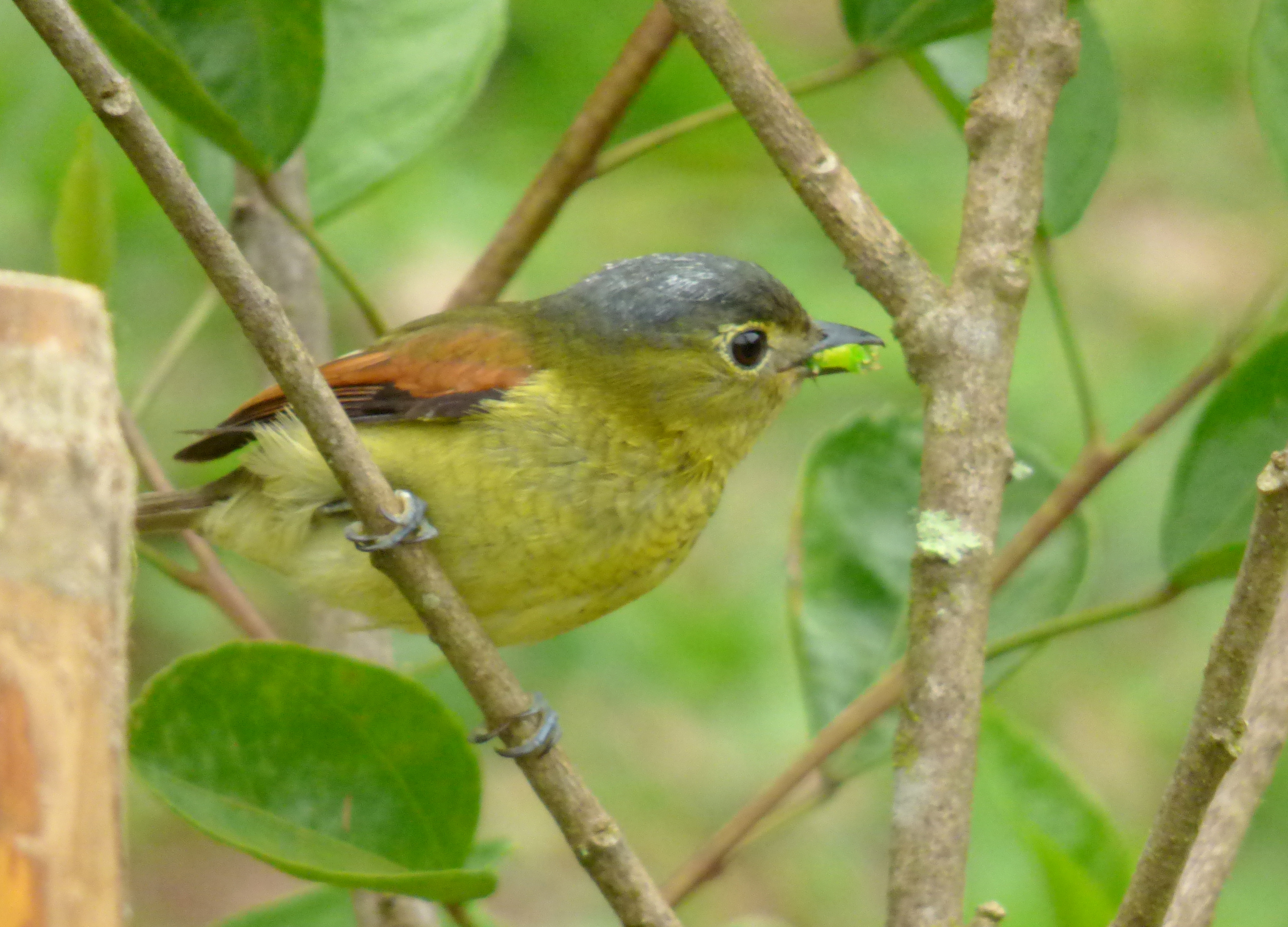 Pachyramphus versicolor (Cabezón barrado) - Hembra